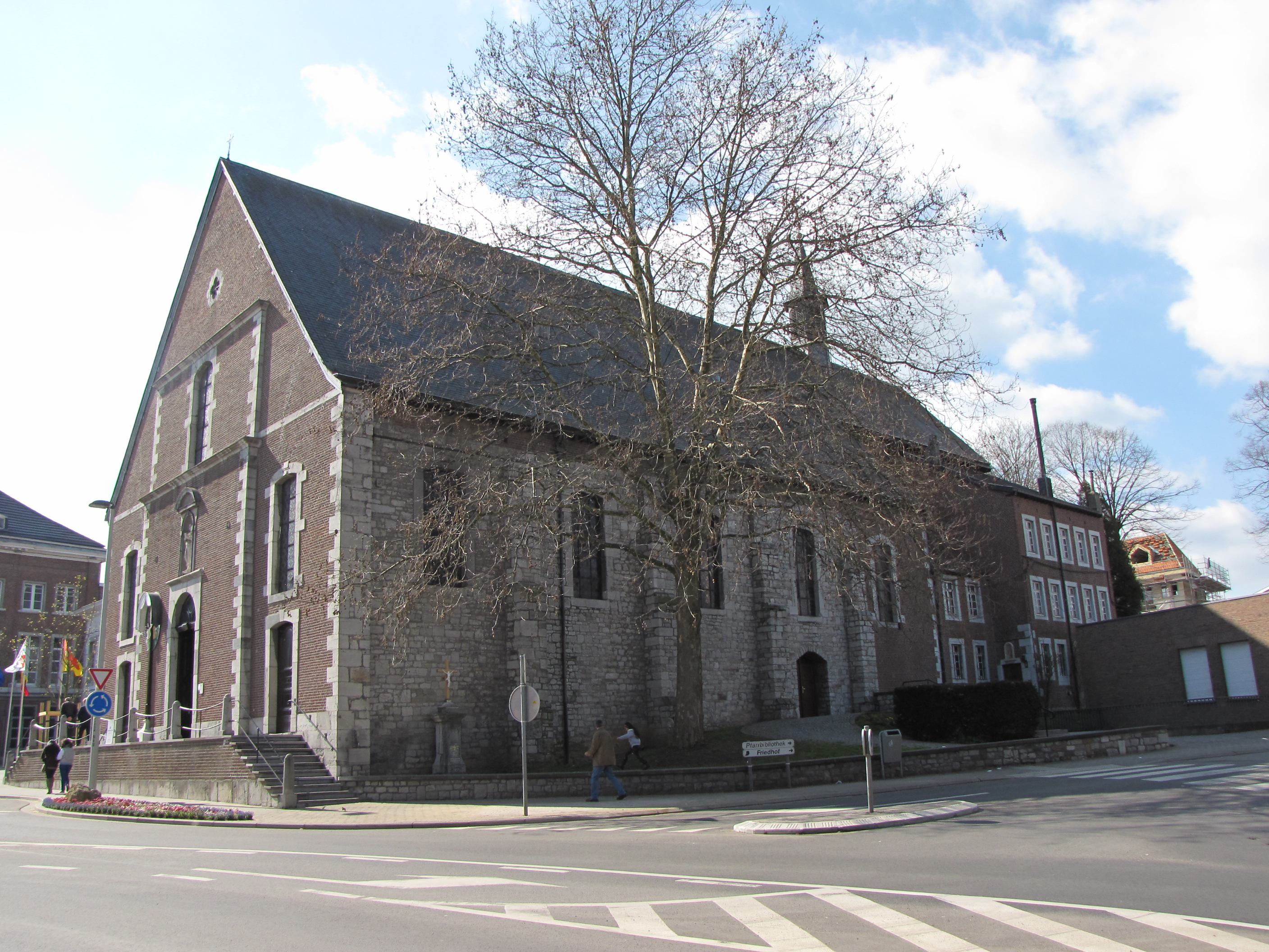 Eglise de l'Immaculée Conception